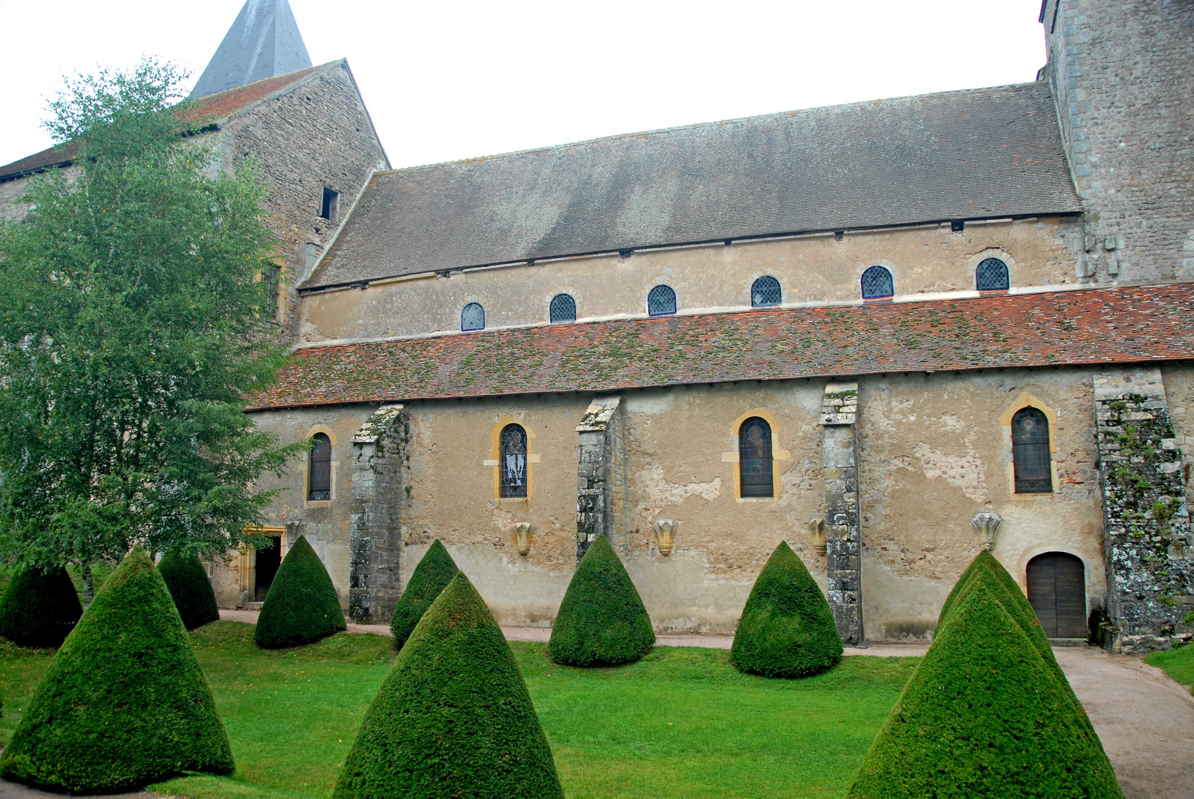 Prioratskirche, Langhaus u. "Kreuzgang" von S